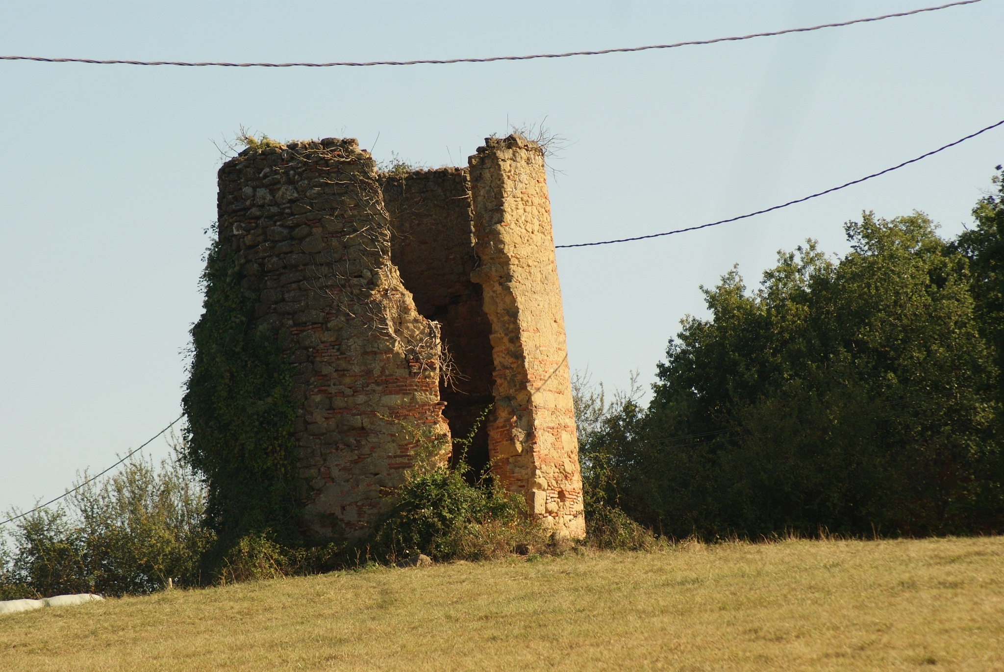 Ruïne van de windmolen van Saint-Blancard (Gers, Frankrijk).